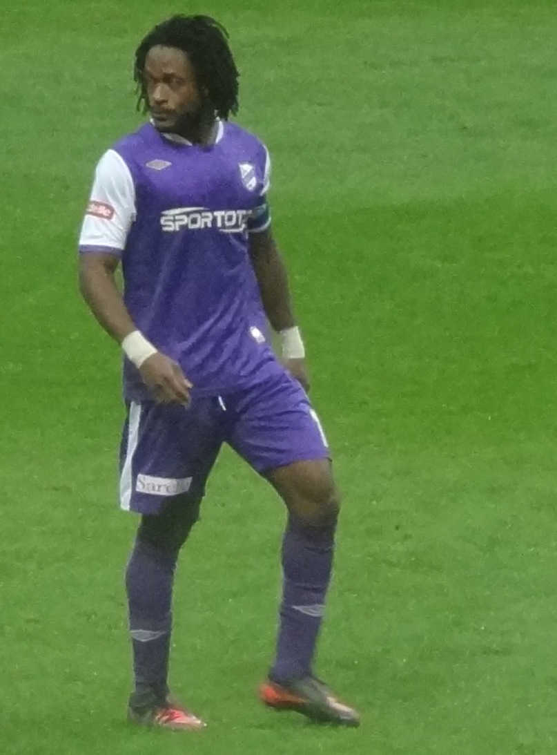 Gosso Galatasaray maçında